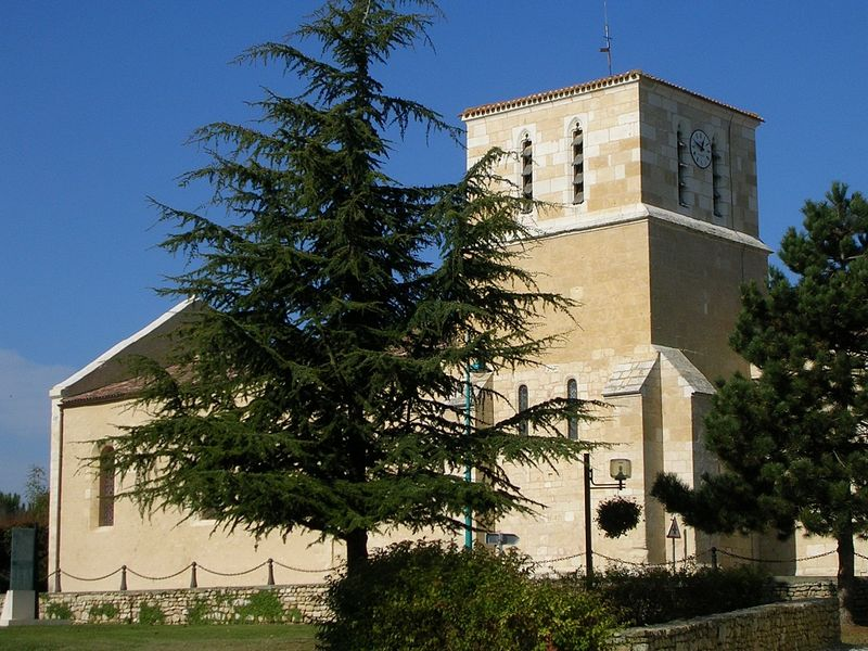 Eglise Saint Pierre CRAVANS